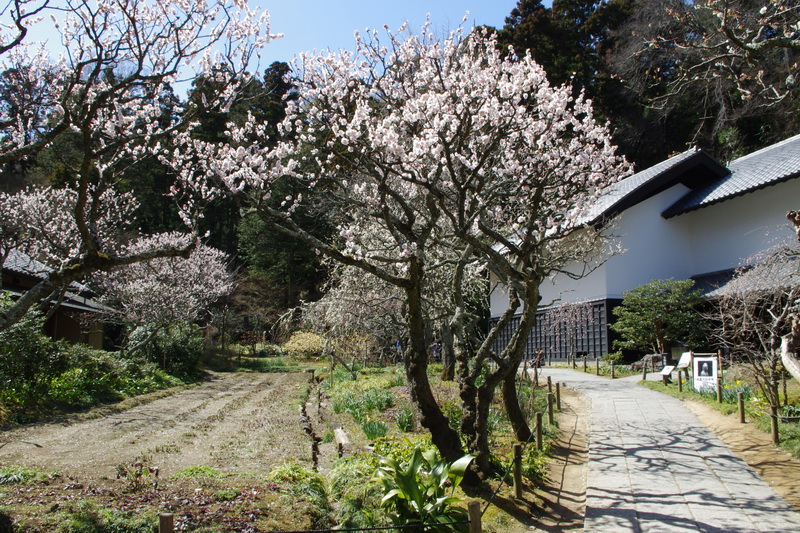 宝蔵前の梅